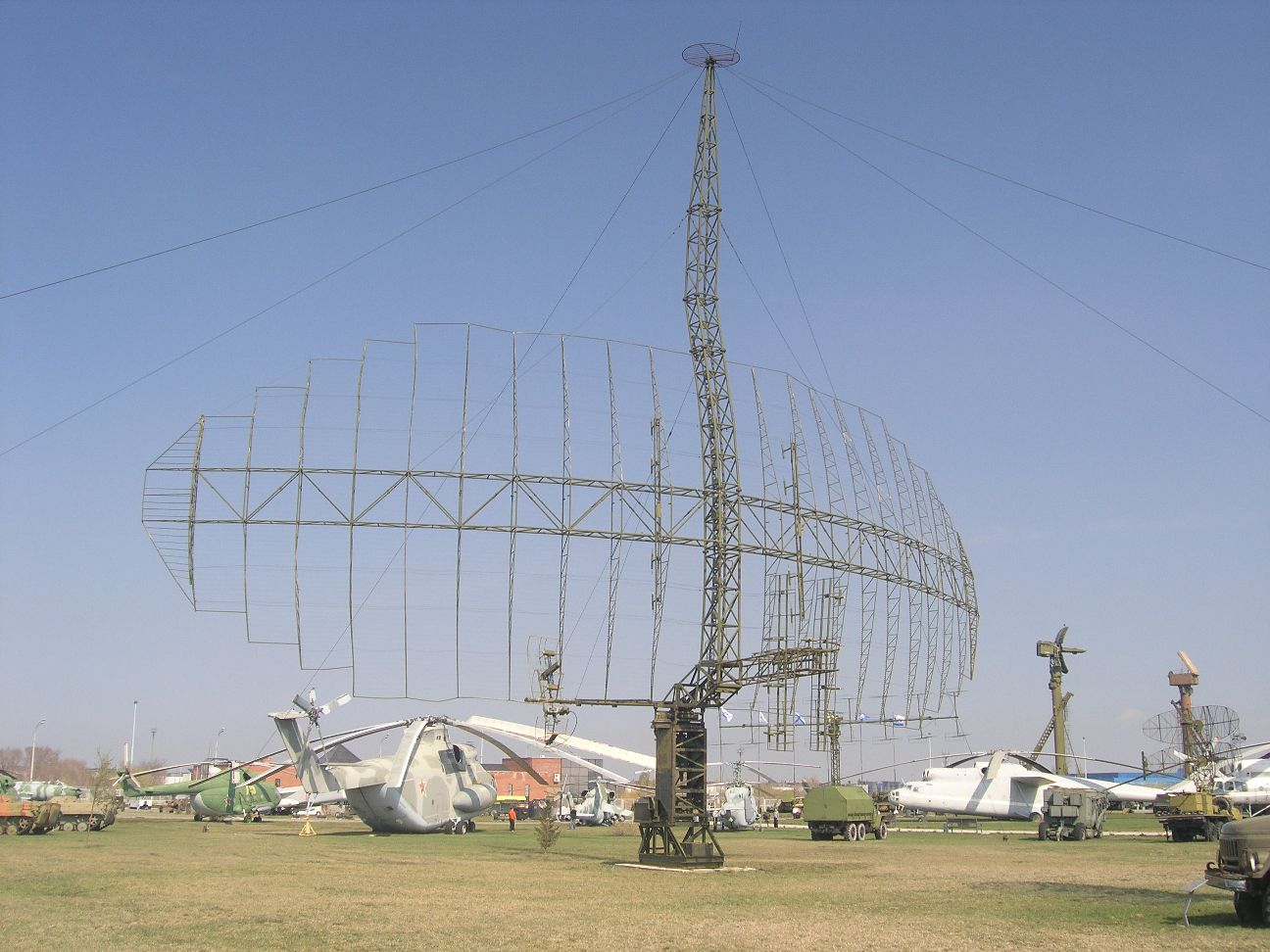 Антенна РЛС П-14 в Техническом музее Тольятти